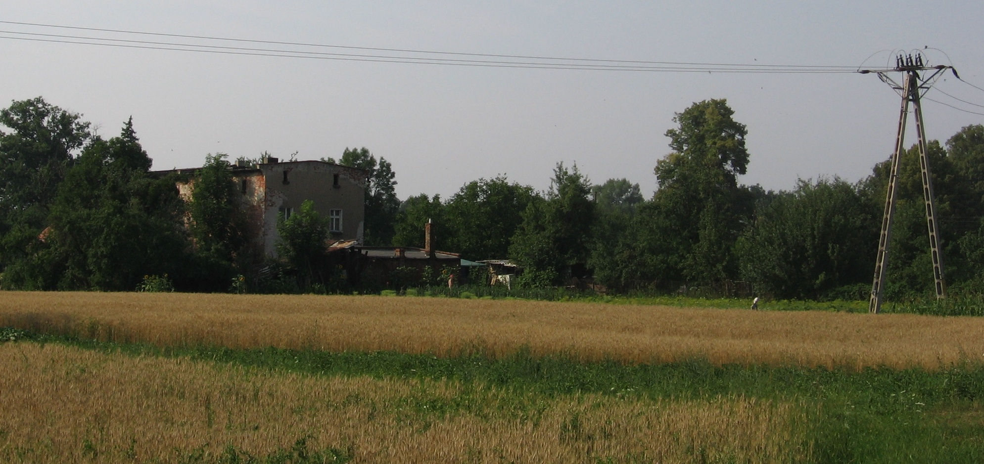 Nowa Karczma settlement, Wrocław, Poland